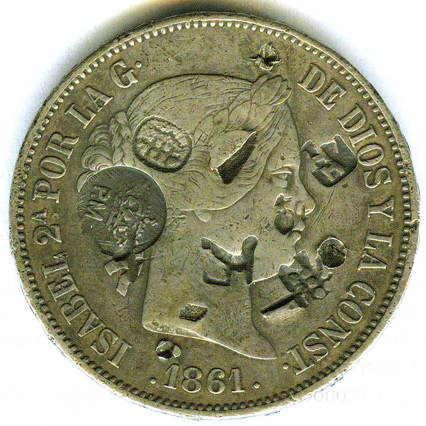 Moneda con contramarca para Mozambique.